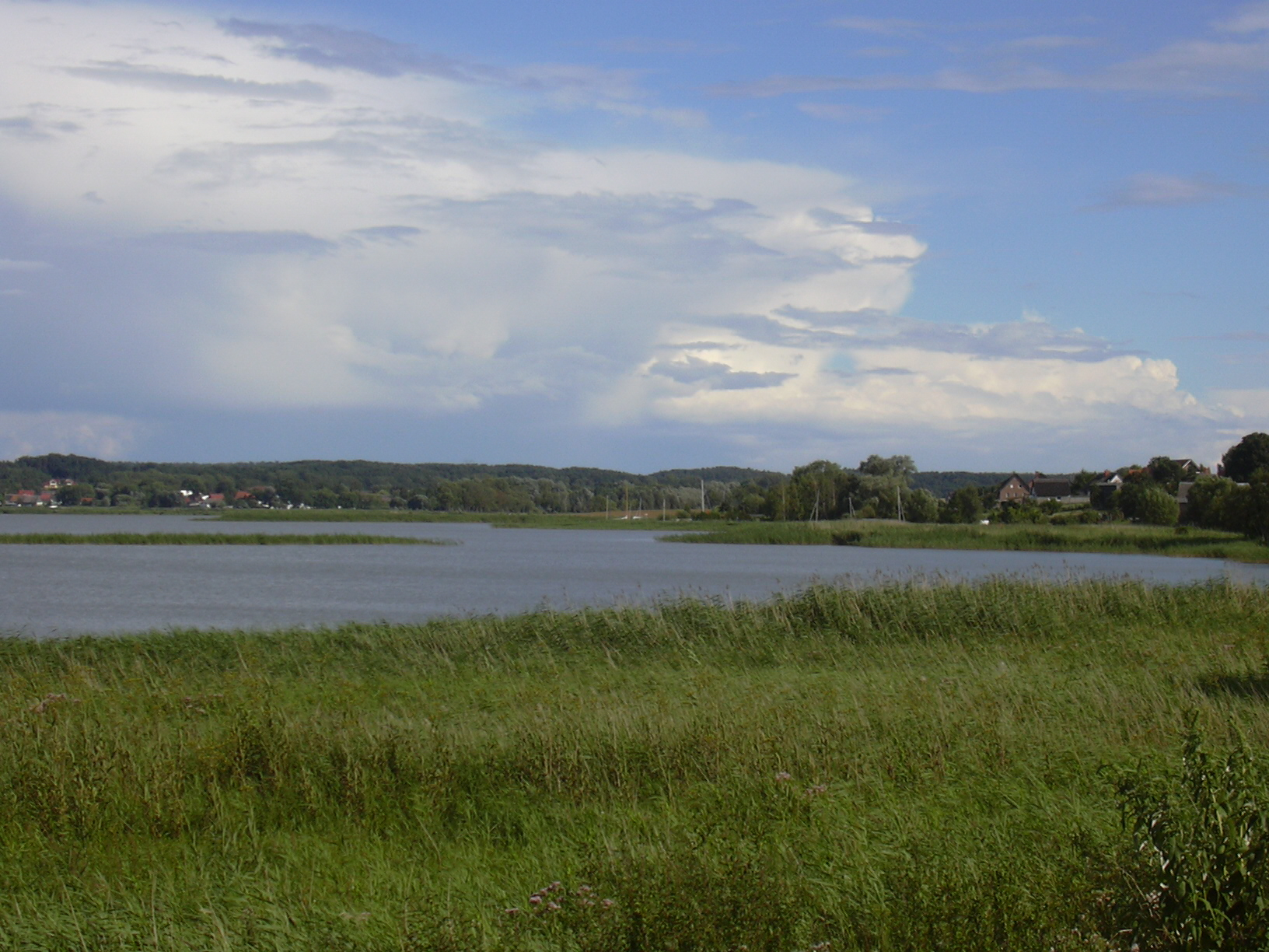 Schilflandschaft am Balmer See, Achterwasser, Mecklenburg-Vorpommern, Deutschland.